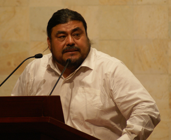 Flavio Sosa Villavicencio, diputado local en el Congreso del Estado de Oaxaca.